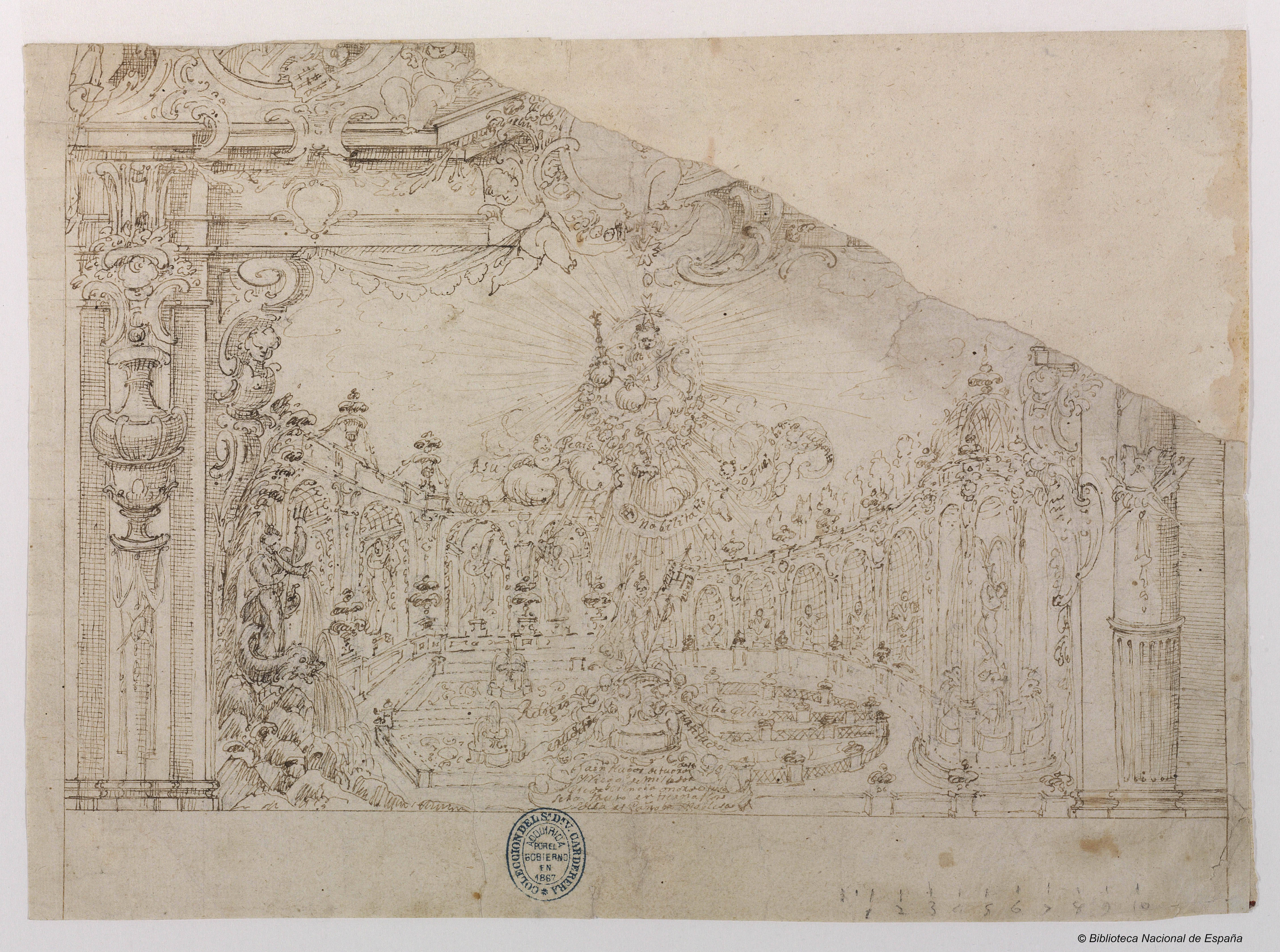 Decoración teatral, dibujo a pluma y tinta marrón sobre papel amarillento verjurado. Madrid, Biblioteca Nacional, signatura DIB/14/47/54